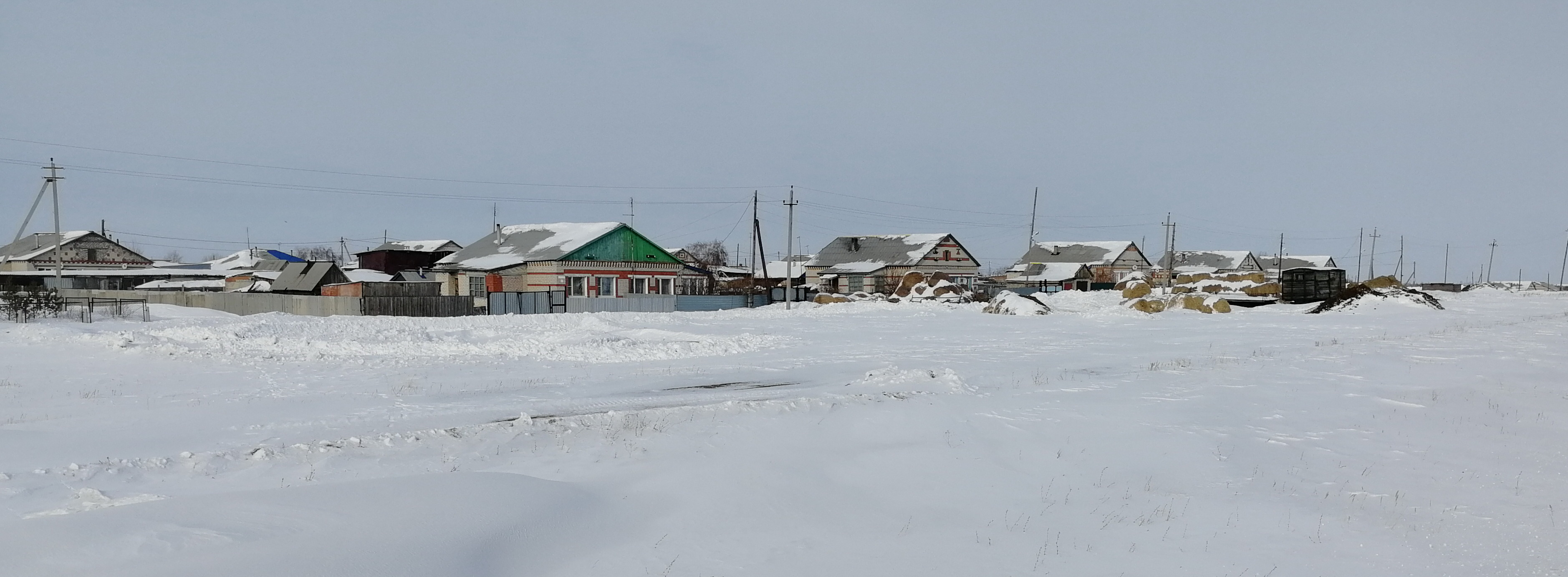 улица Каракулька Троицкий район